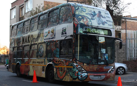 La copa aún enfrenta problemas como la seguridad en los estadios y el transporte publico en la ciudad de Johannesburgo.